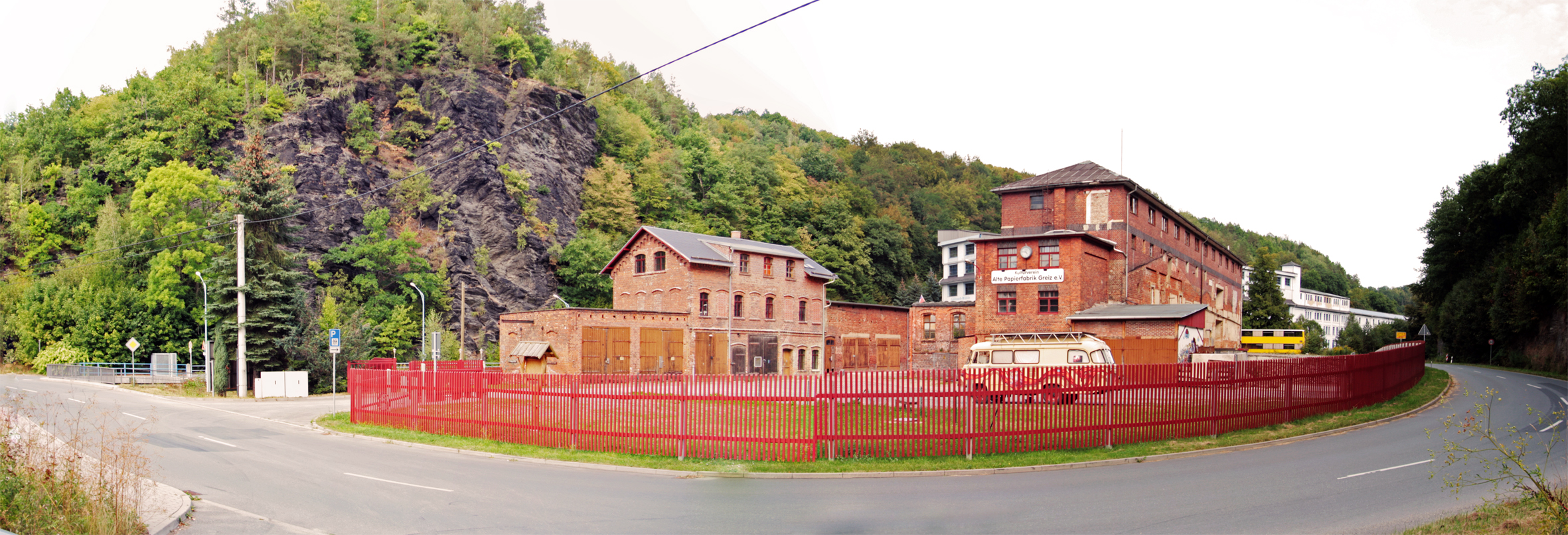 Gelände des Vereins Alte Papierfabrik Greiz e.V., die ehemalige Berufsschule der VEB Papierfabrik Greiz. Davor war es die Göltzschtalbrauerei.